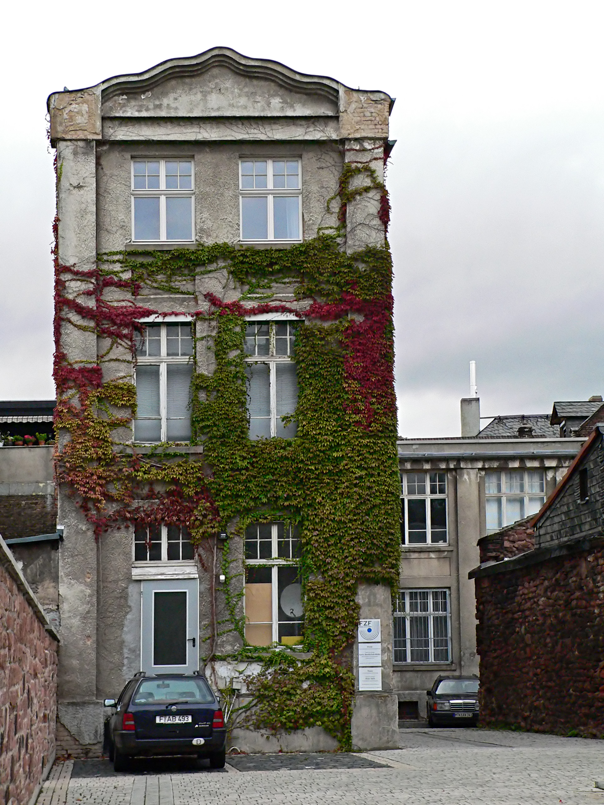 Bolongarostraße 150H, ehemaliges Druckhaus des Höchster Kreisblatts.